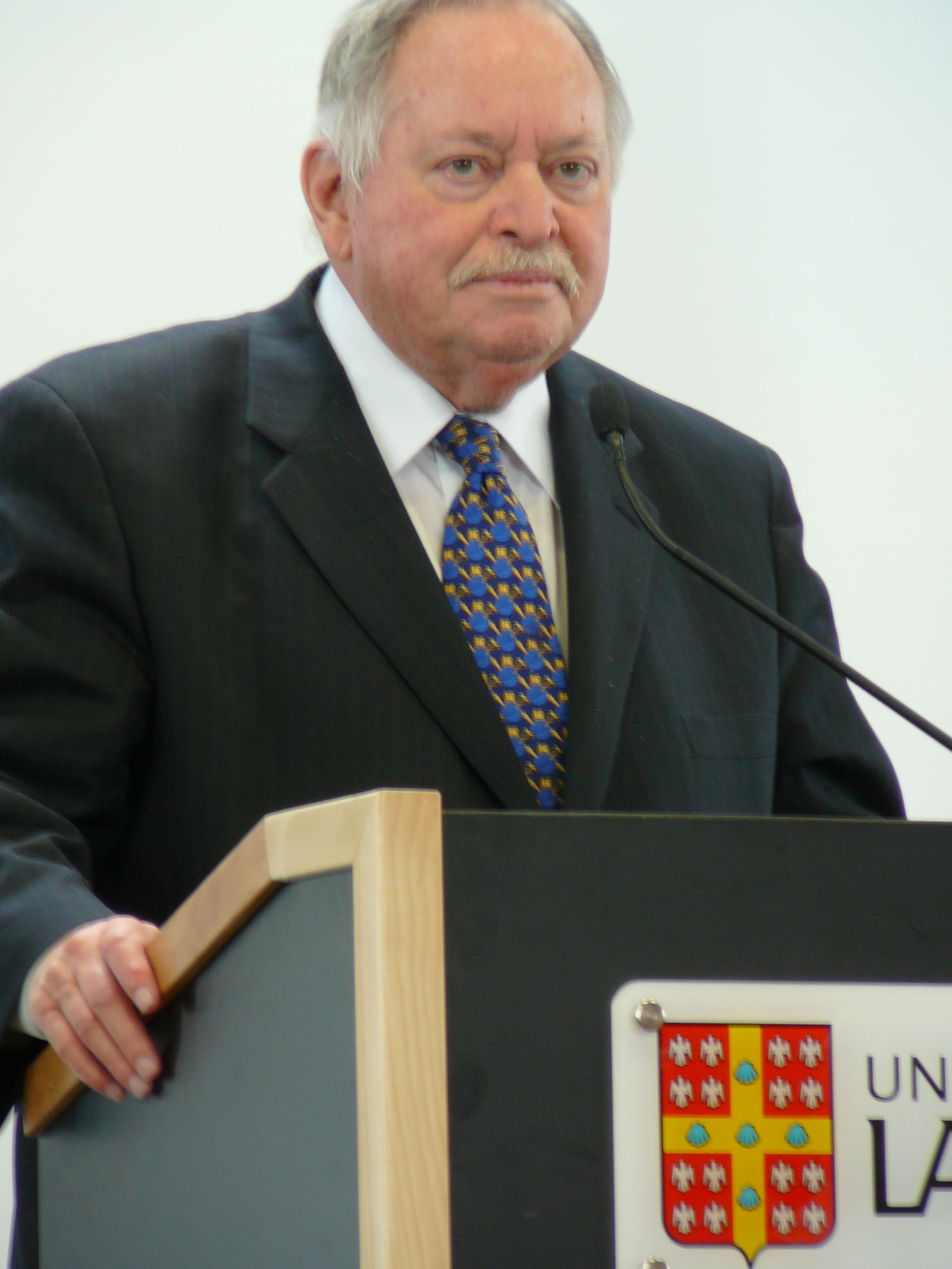 Jacques Parizeau, 26e Premier ministre du Québec donnant une allocution à l'Université Laval de Québec. Photo prise par Joël Truchon 20 mars 2007